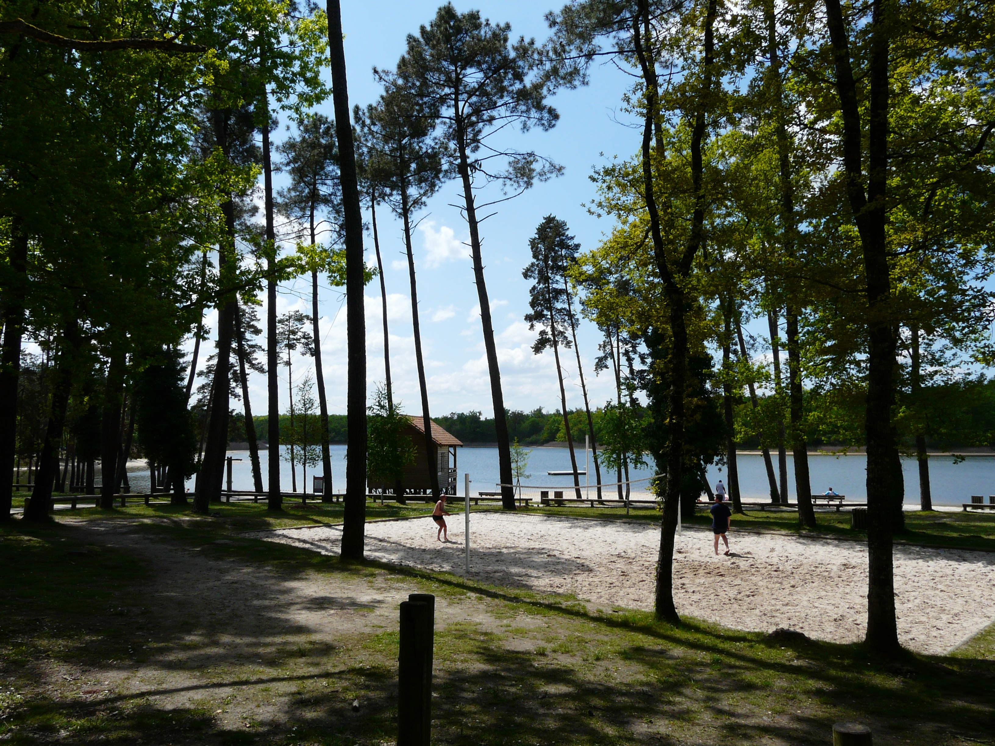 Le grand étang de La Jemaye, Dordogne, France